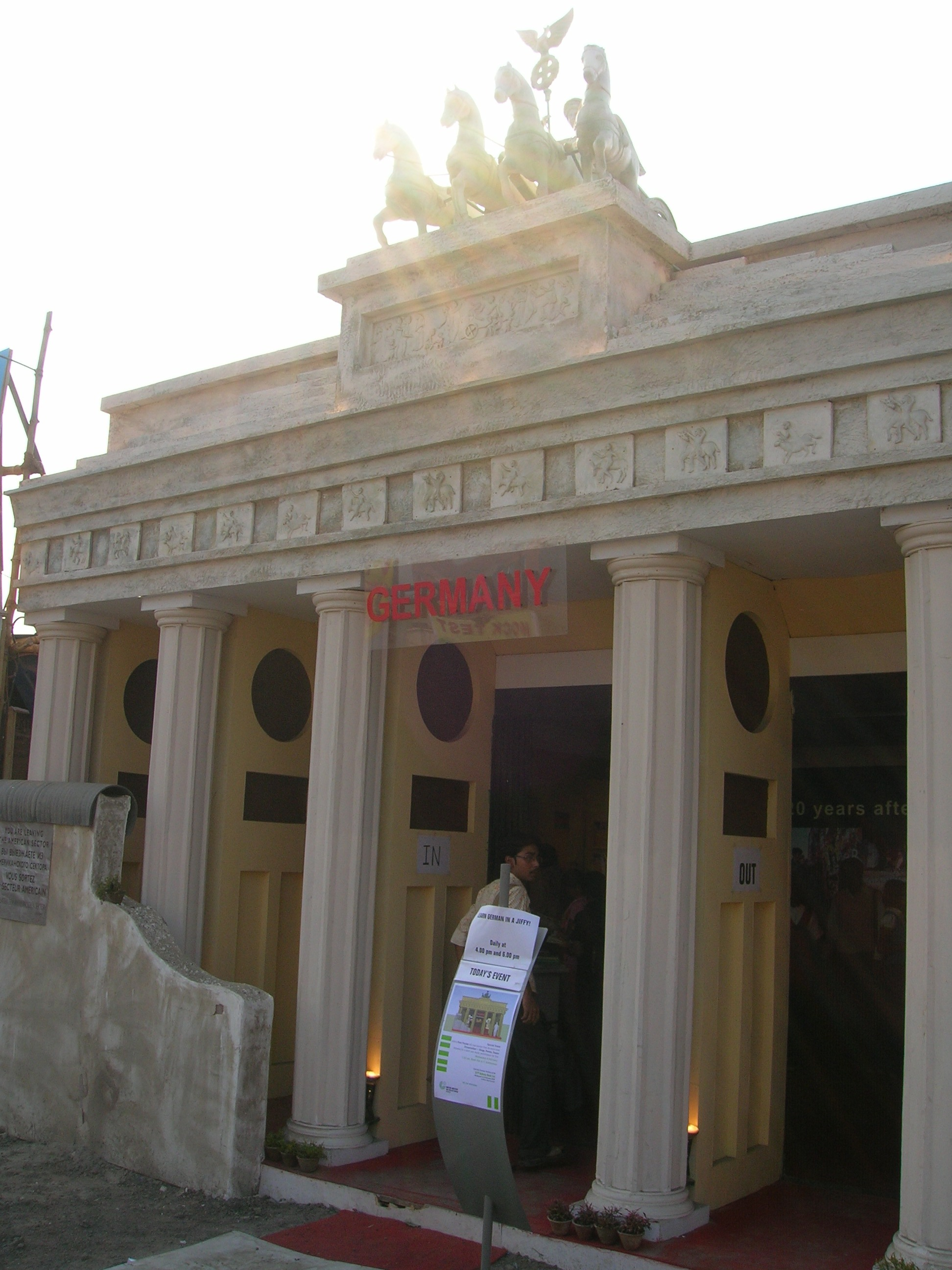 German embassy at Kolkata Book Fair 2009